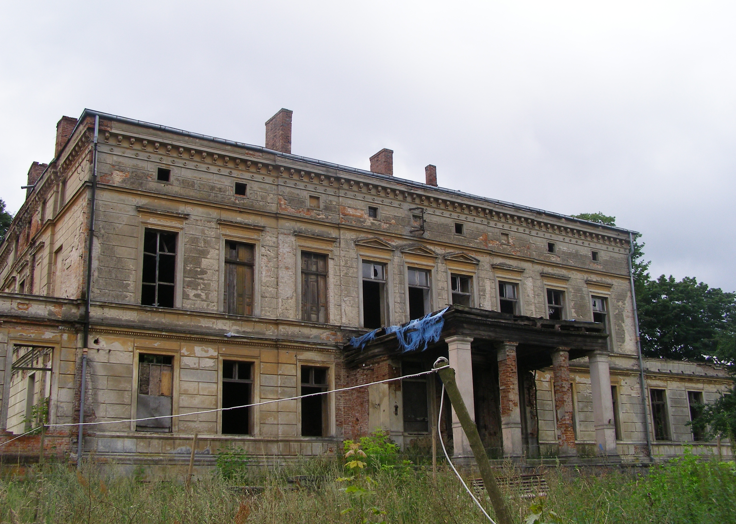 Osiek, pałac, poł. XIX